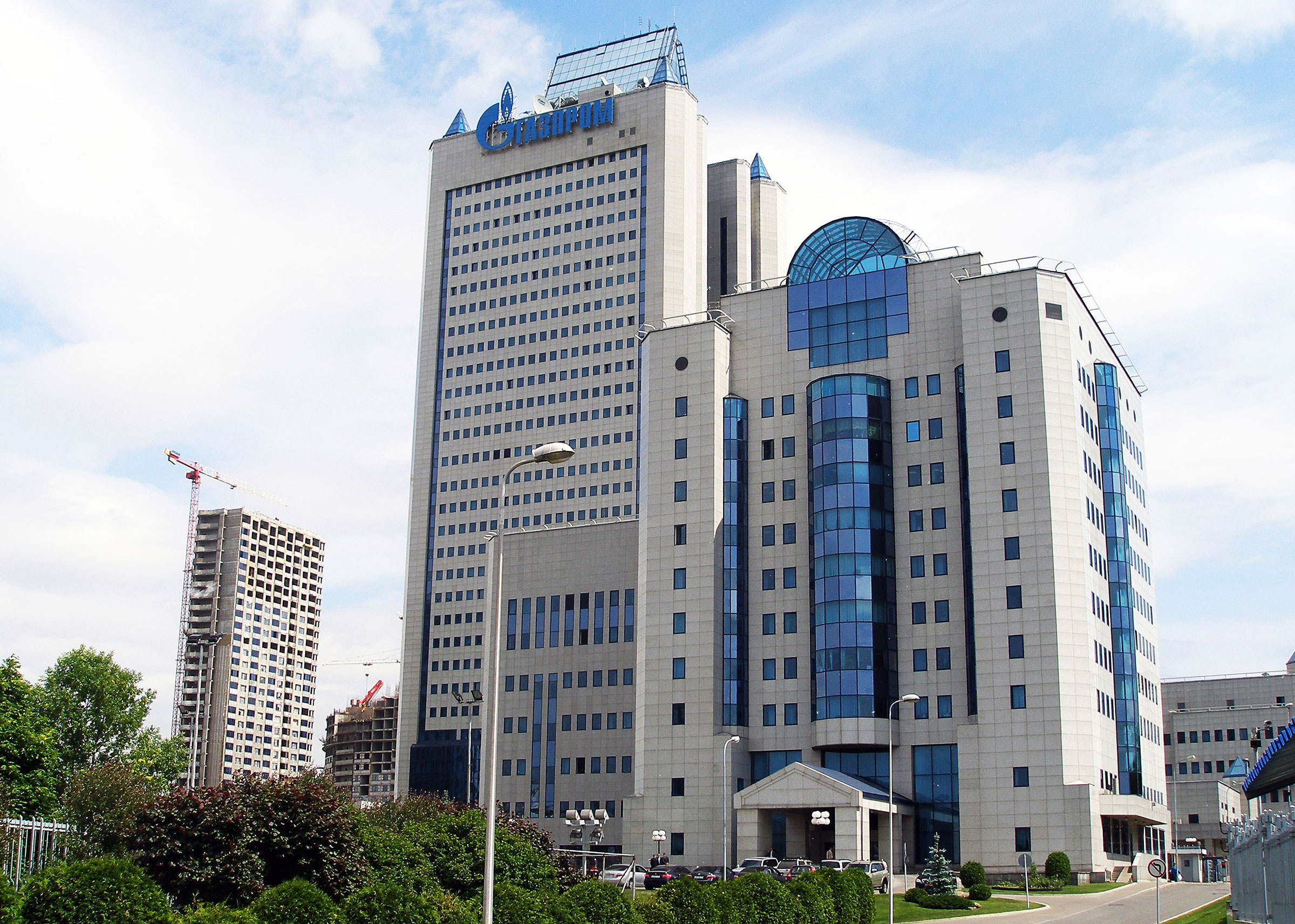 «Газпром» со стороны Хлебобулочного проезда.